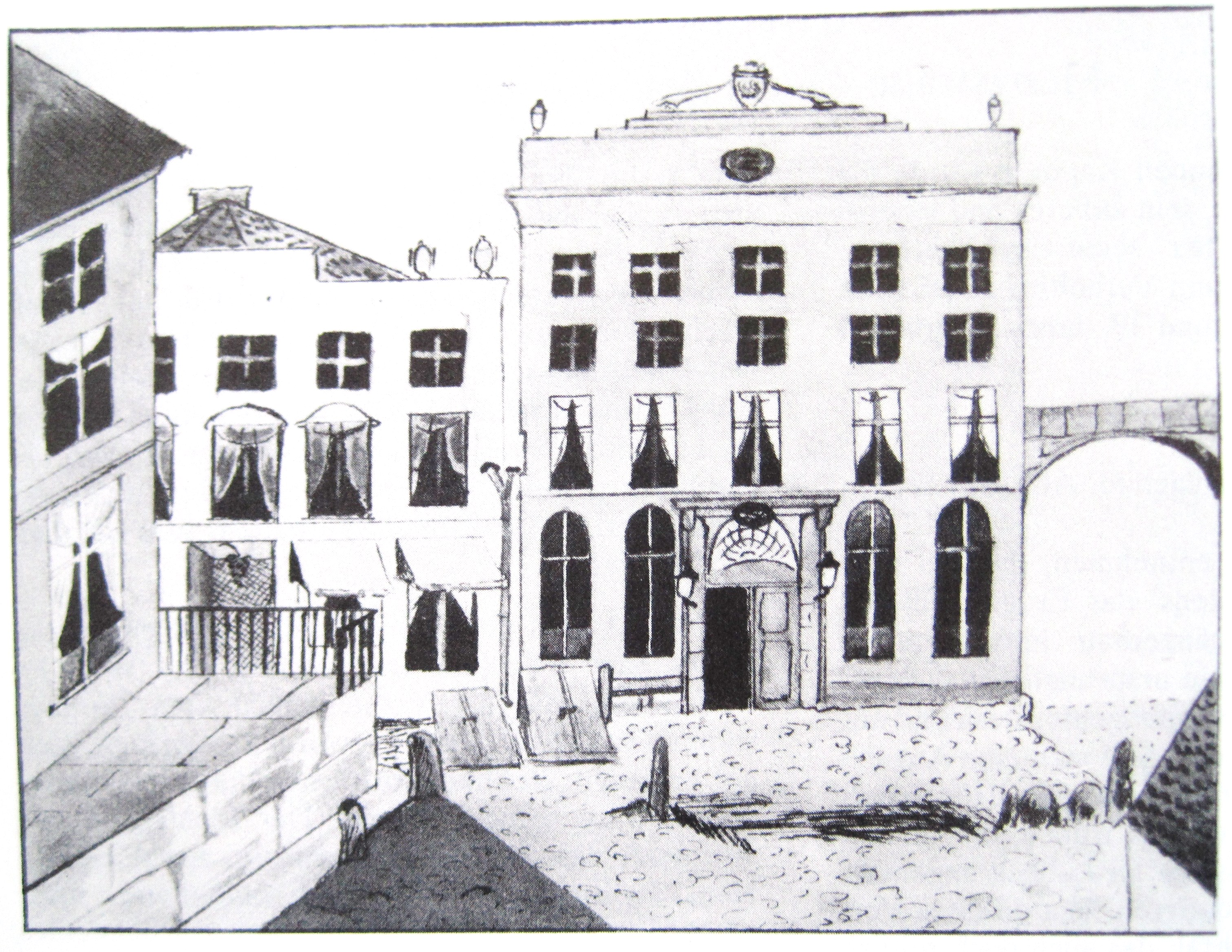 Schütting (Versammlungshaus) der Schonenfahrer in Lübeck, Mengstraße 18. Zugleich auch als Postgebäude genutzt. Aquarell. Rechts Schwippbogen über die Straße Fünfhausen.